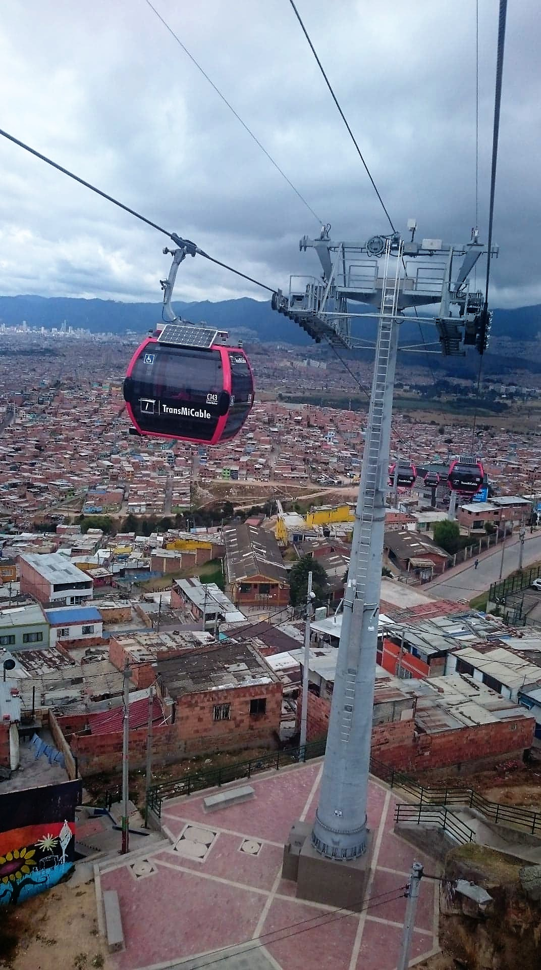 TransMiCable